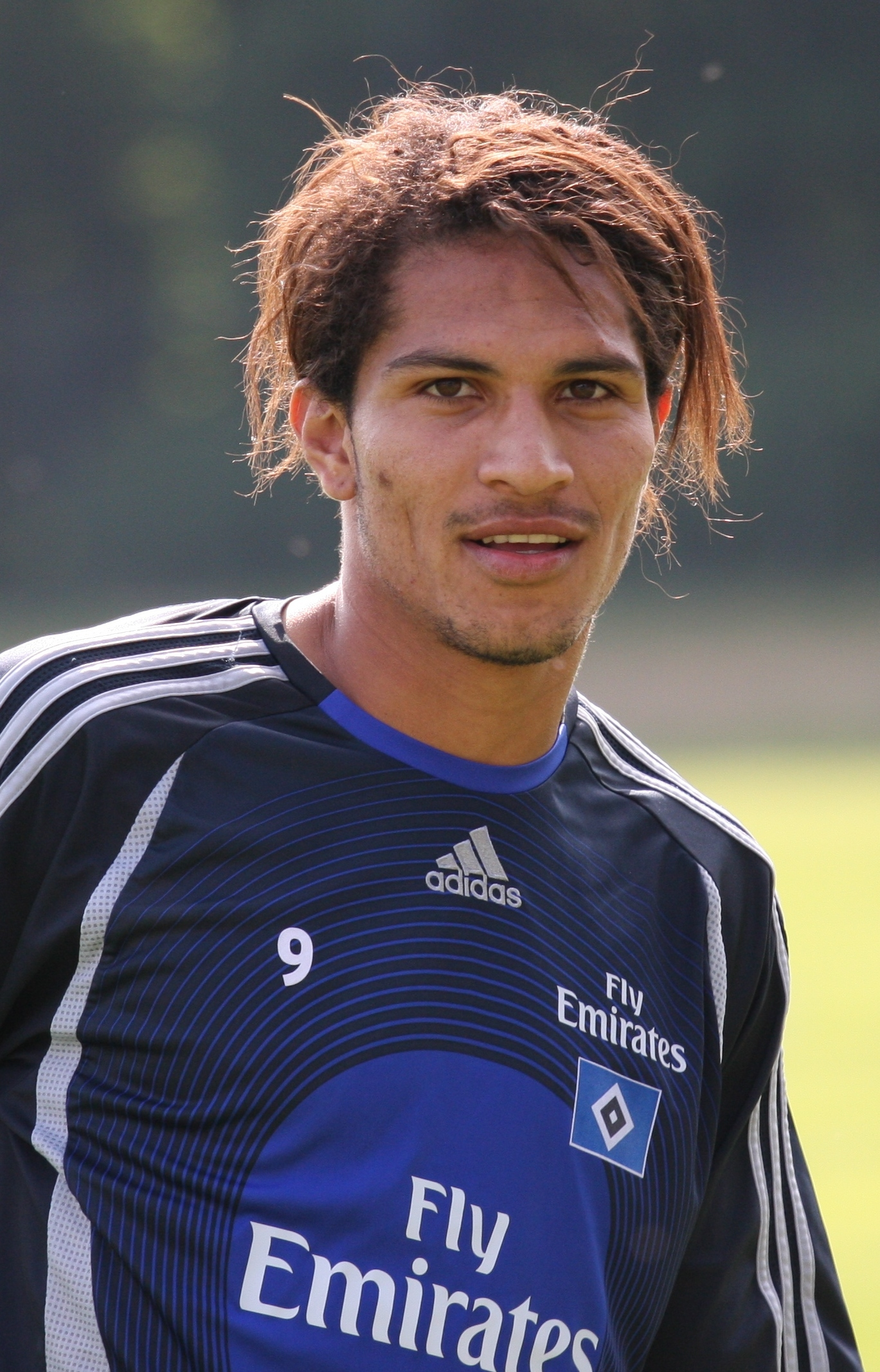 Paolo Guerrero beim Training an der HSH Nordbank Arena 2008.